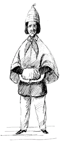 Christian Julius de Meza wie er den beiden preußischen Parlamentären am 31.1.1864 gegenüber trat